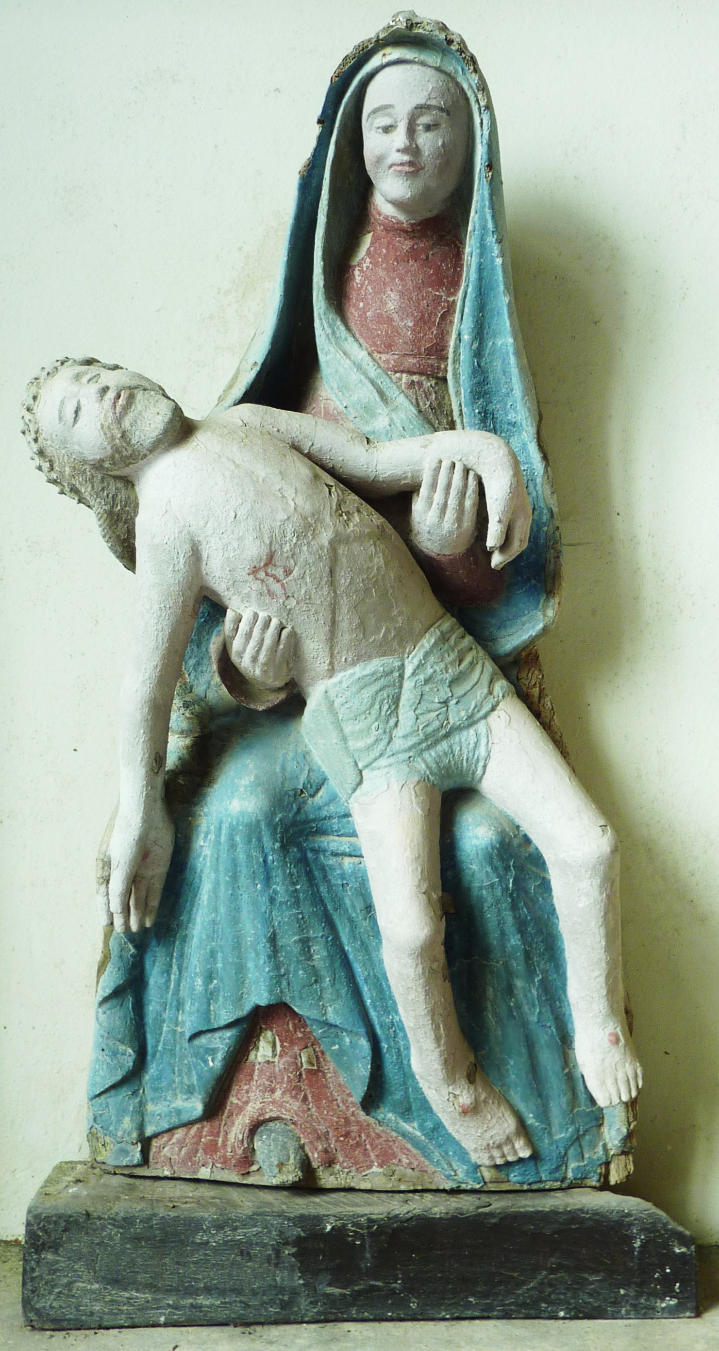 Plougonven: église paroissiale, Piètà